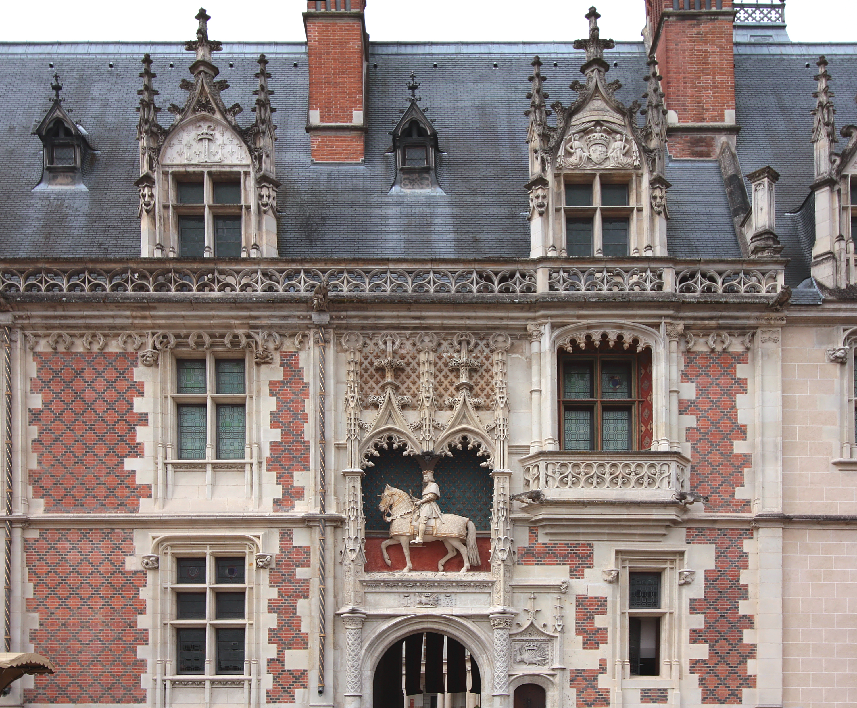 Schloss Blois, Departement Loir-et-Cher/Frankreich - Zugangsseite mit dem Reiterstandbild Ludwigs XII. aus dem 19. Jahrhundert über dem Portal